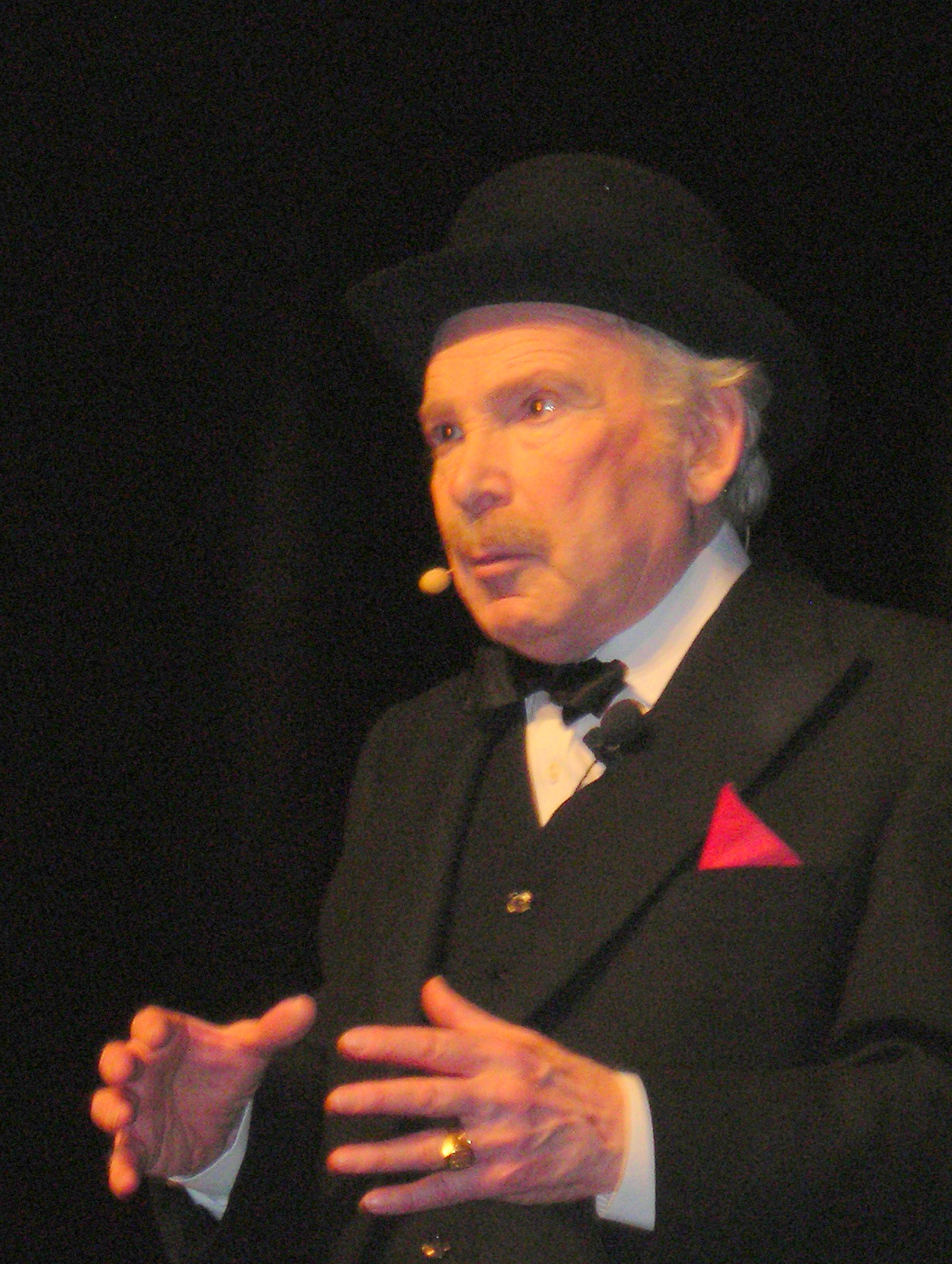 Popeck sur scène au Centre Culturel Marcel Pagnol de Bures-sur-Yvette